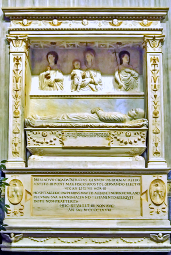 San Giovanni Battista dei Genovesi (Rom); Grabmonument für Meliaduce Cicala